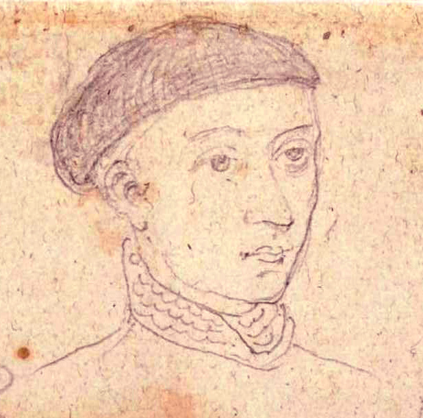 Portrait dessiné de Philippe le Bon, duc de Bourgogne, âgé d'une trentaine d'années, d'après une peinture disparue, probablement le volet gauche d'un tryptique datant du XVe siècle, entre 1425 et 1430. Cette peinture ornait l'église du monastère de la Thieulloye, où Antoine de Succa dessina cette copie en 1601. Mémoriaux d'Antoine de Succa, ms. II 1862/1, Bibliothèque Royale, Cabinet des manuscrits, folio 34.